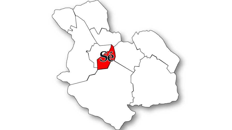 Evolução da População